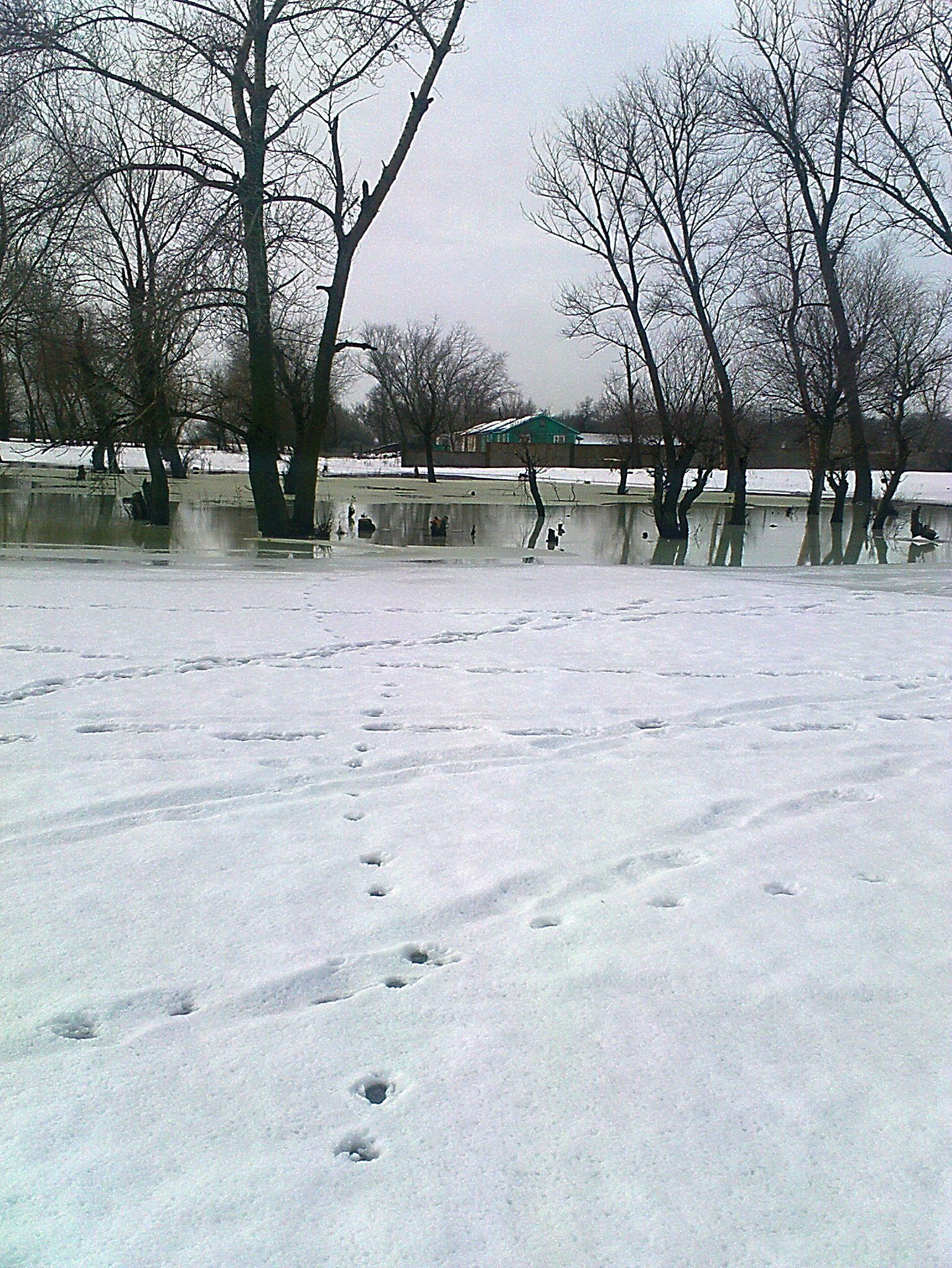 Зимний остров